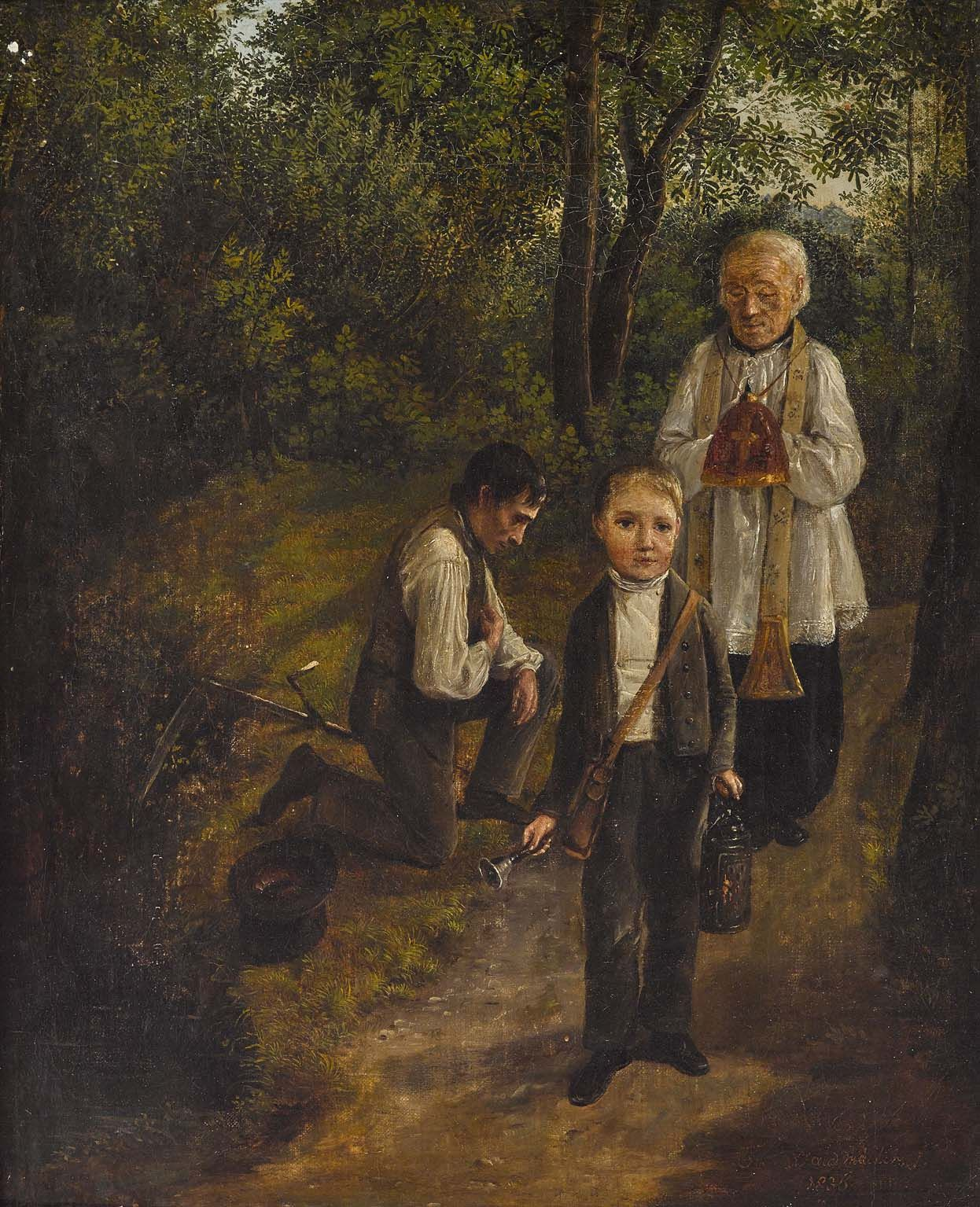 Der Versehgang. R. u. signiert und 1836 datiert. Öl auf Lwd. 37,8 x 30,5 cm.